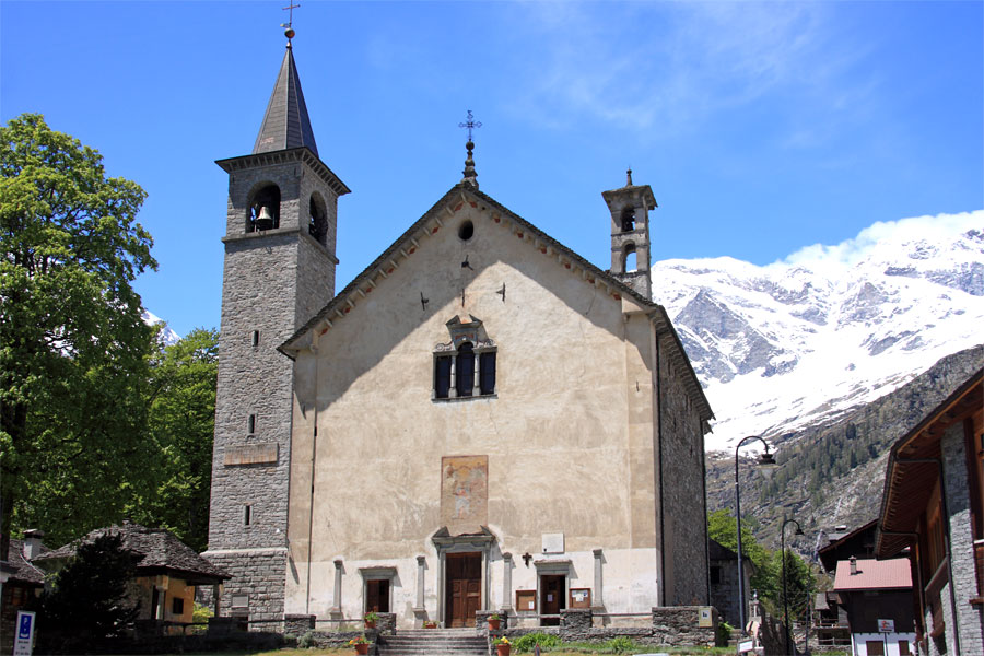 Macugnana, chiesa parrocchiale di Santa Maria Assunta